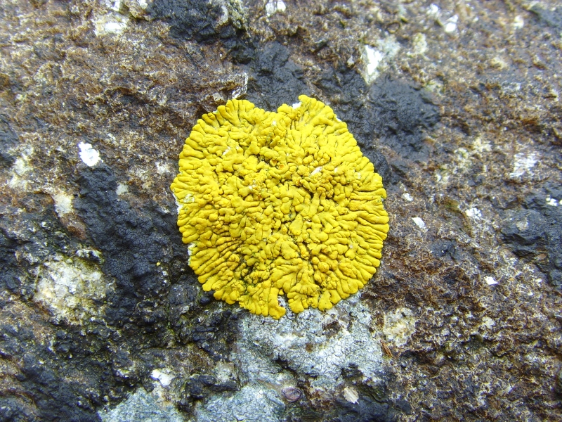 Caloplaca thallincola, pointe du Raz, Plogoff, Finistère, France